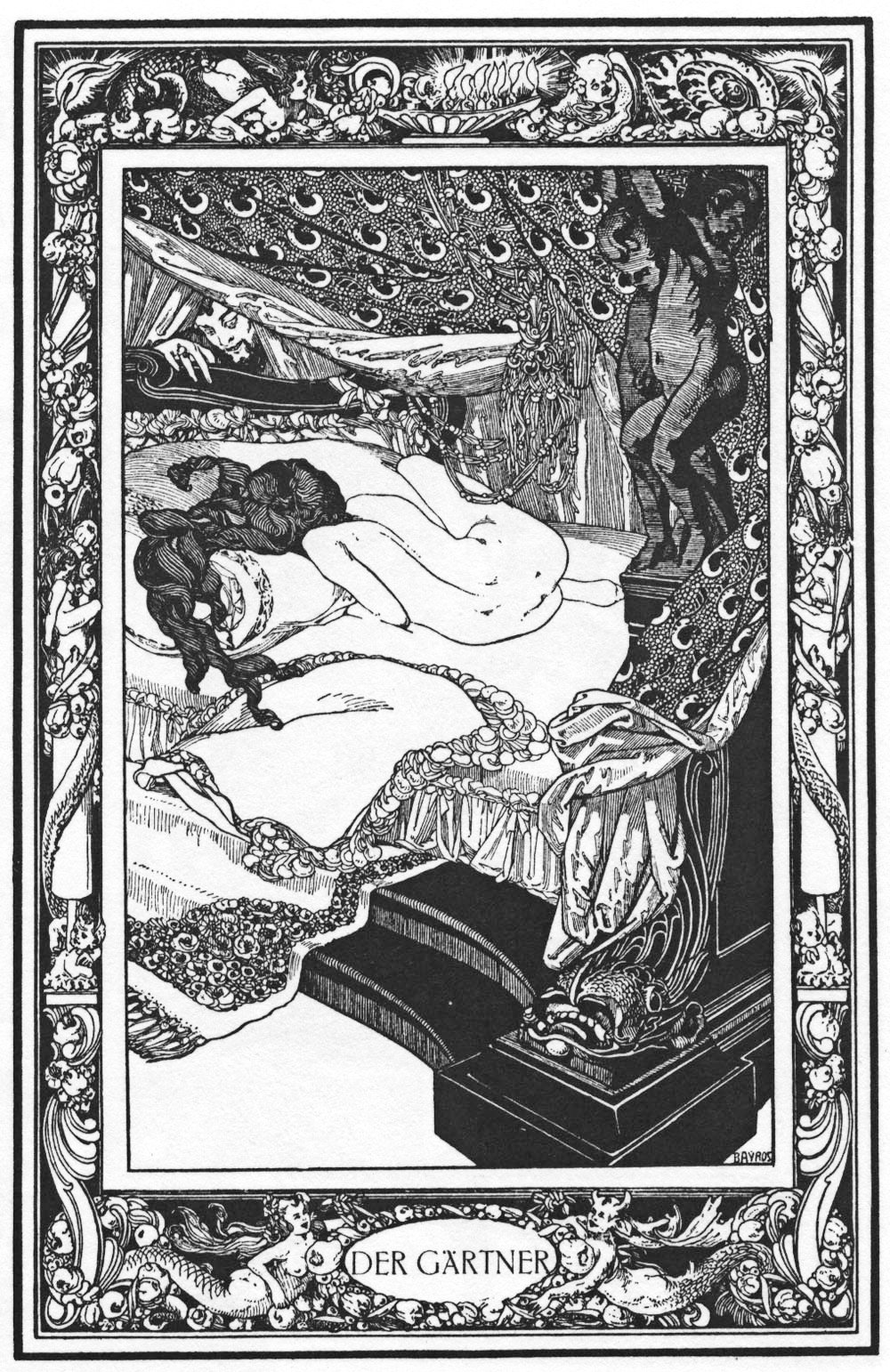 Illustration for Giambattista Basile's "Pentamerone".